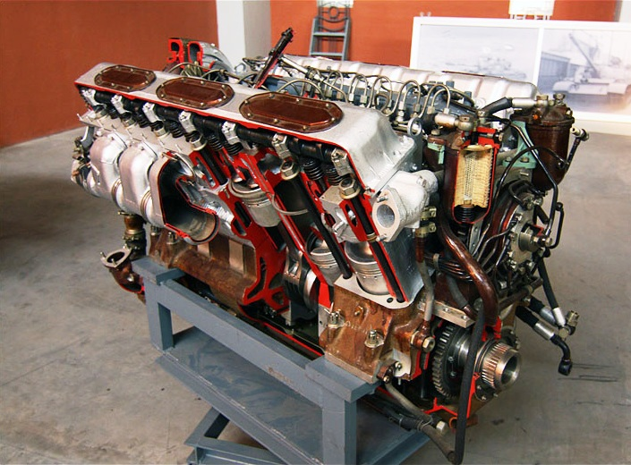 Motorblock eines T-90-Panzers im Panzermuseum Nischni-Tagil.